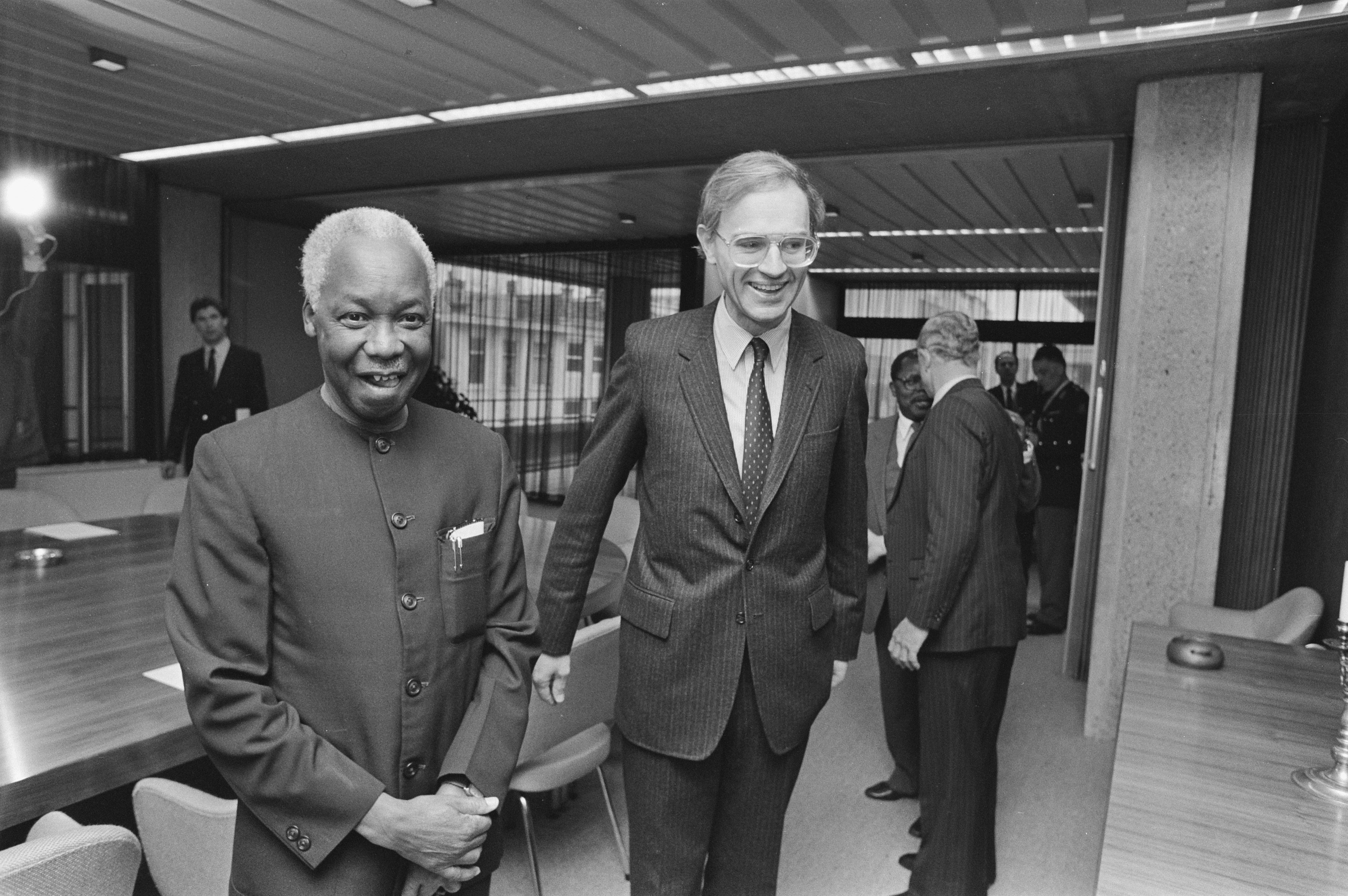 Collectie / Archief : Fotocollectie Anefo Reportage / Serie : [ onbekend ] Beschrijving : Bezoek president Nyerere van Tanzania; president Nyerere (l) en minister Ruding Datum : 12 maart 1985 Trefwoorden : bezoeken, presidenten Persoonsnaam : Nyerere, Julius, Ruding, Onno Fotograaf : Bogaerts, Rob / Anefo Auteursrechthebbende : Nationaal Archief Materiaalsoort : Negatief (zwart/wit) Nummer archiefinventaris : bekijk toegang 2.24.01.05 Bestanddeelnummer : 933-2629